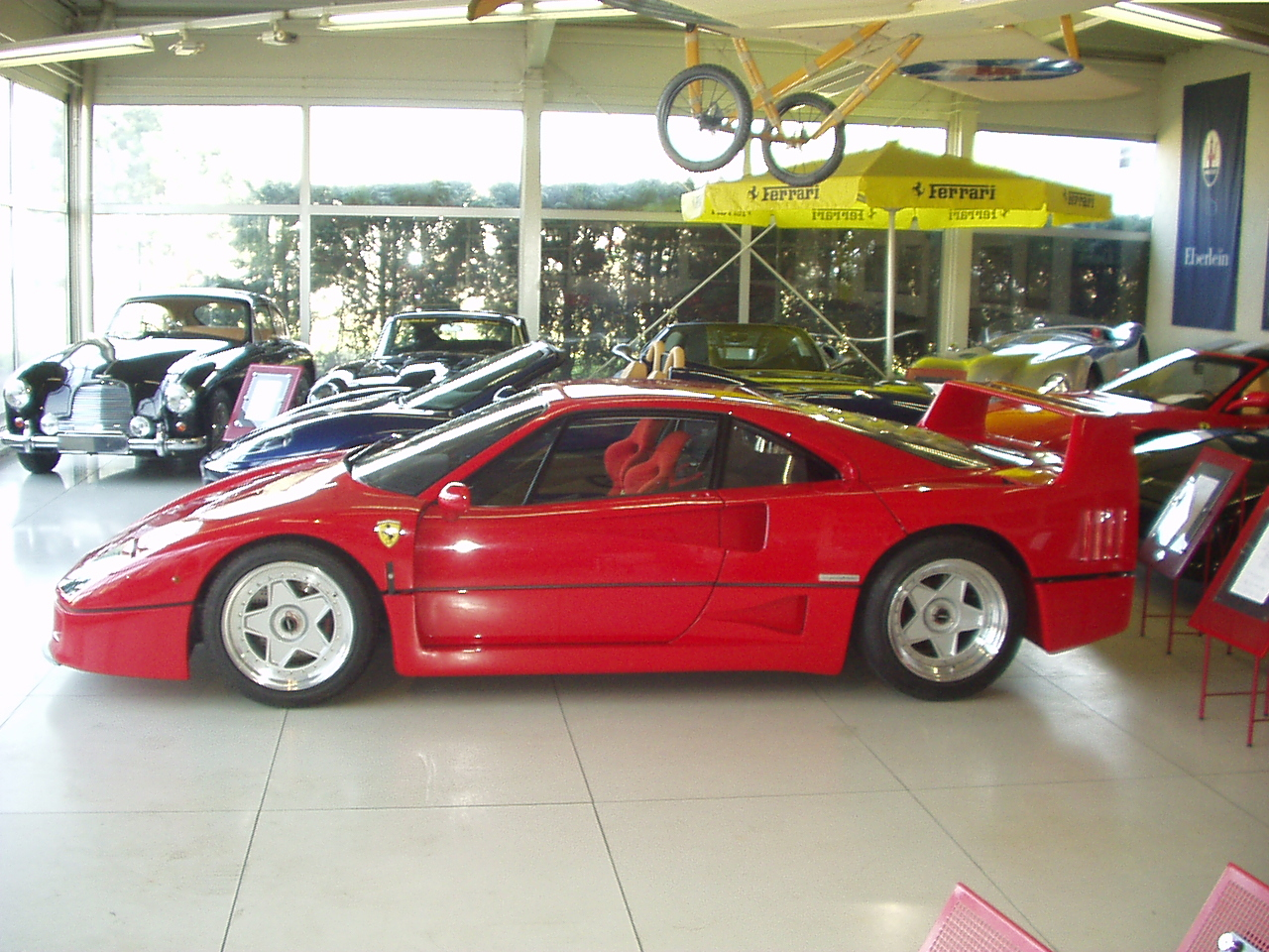 F40 Seitenansicht